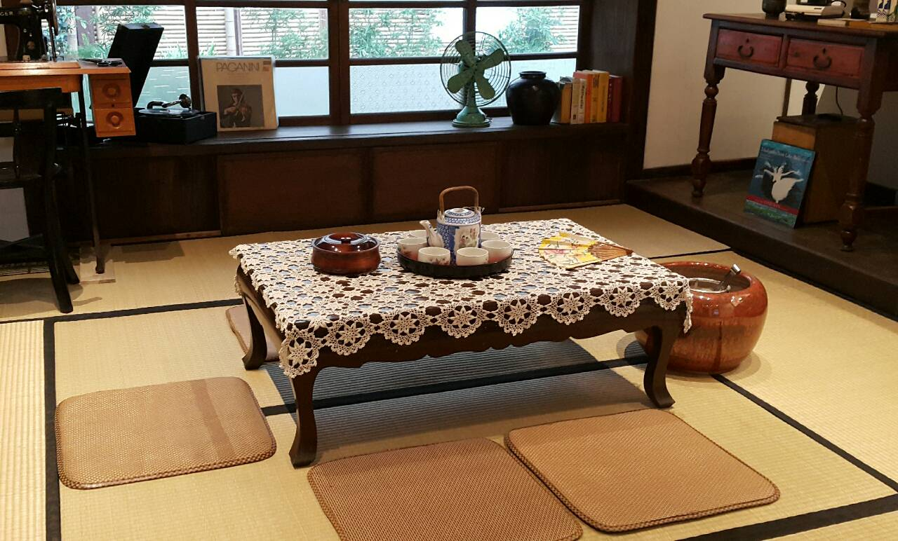 中平路故事館王家座敷。